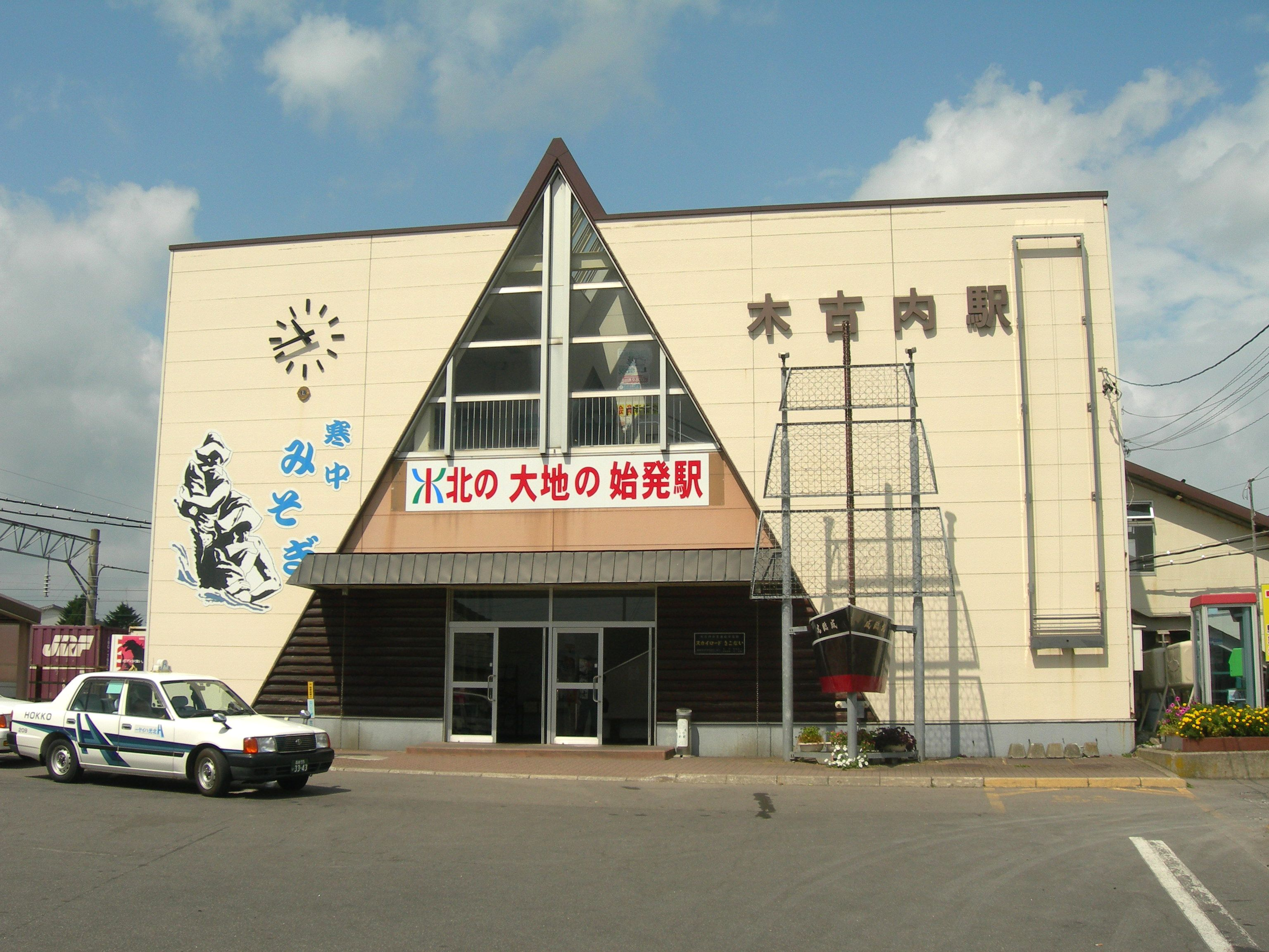 木古内駅